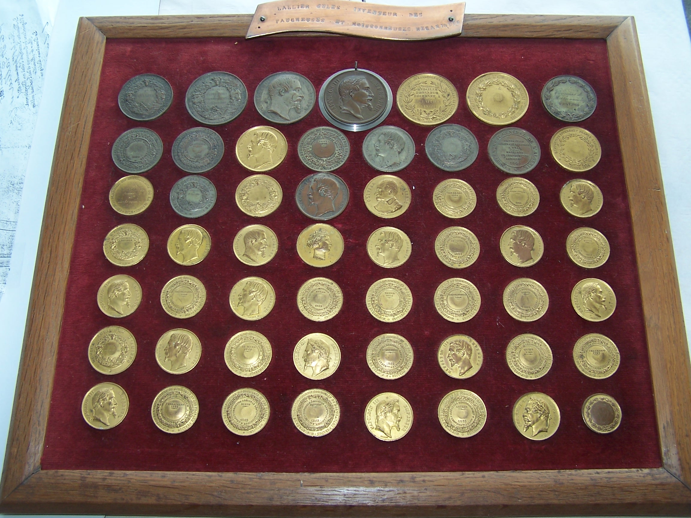 Médailles gagnées lors de différents concours par Jean-Etienne Lallier pour ses inventions.